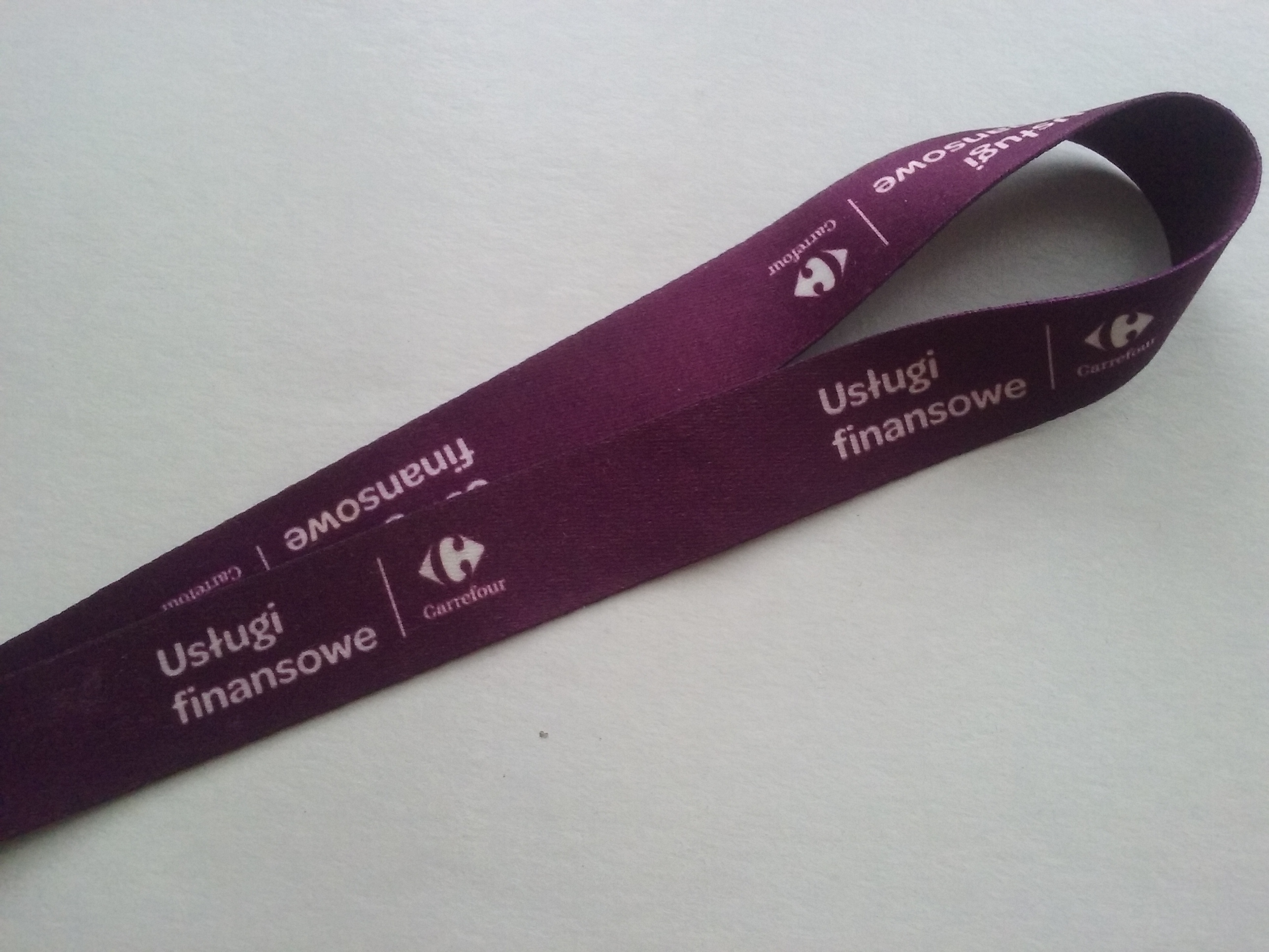 Carrefour Usługi Finansowe. Smycz promocyjna usługi.